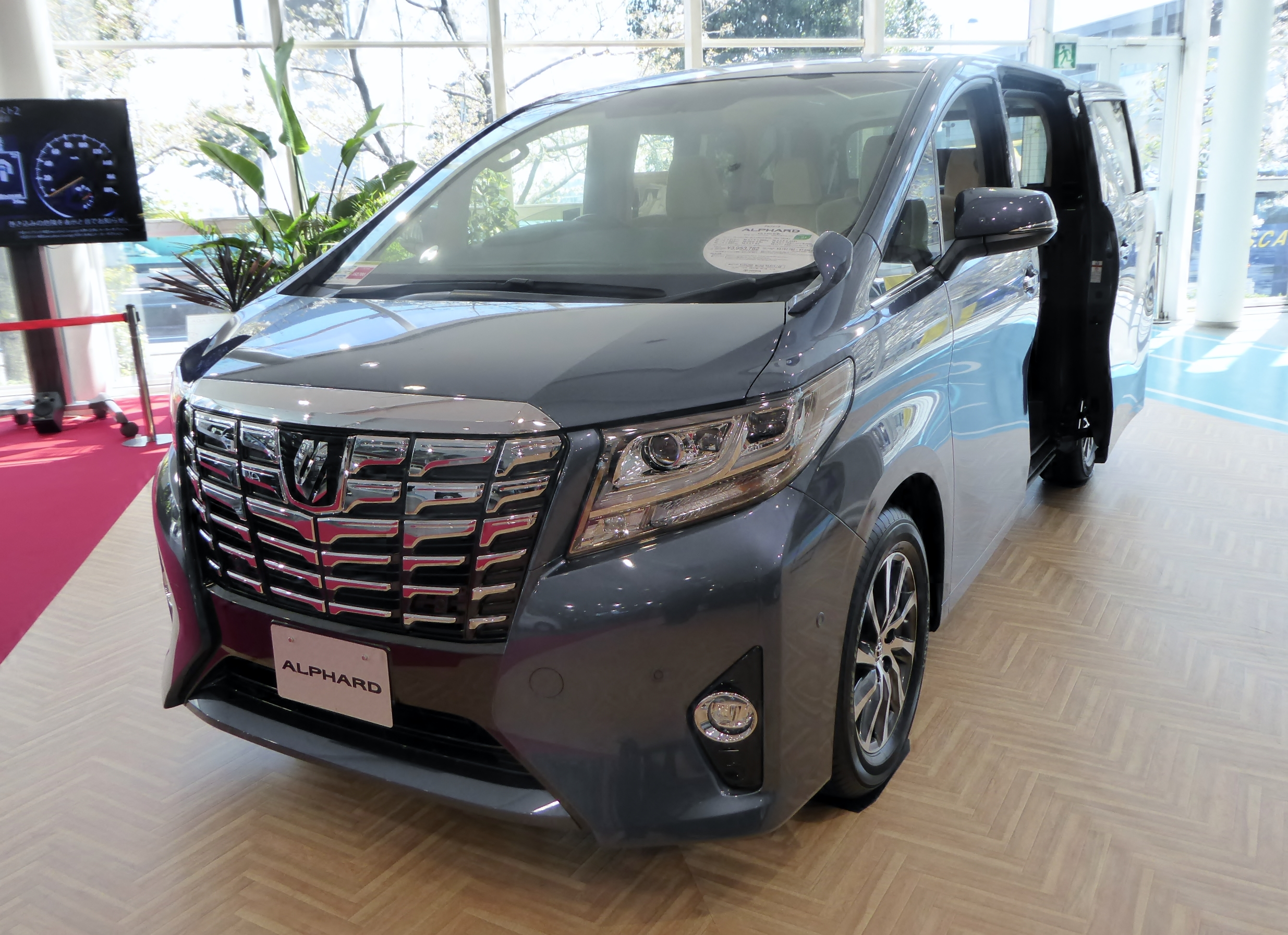 AGH30W型トヨタ・アルファードG 2WDをフロントから撮影。